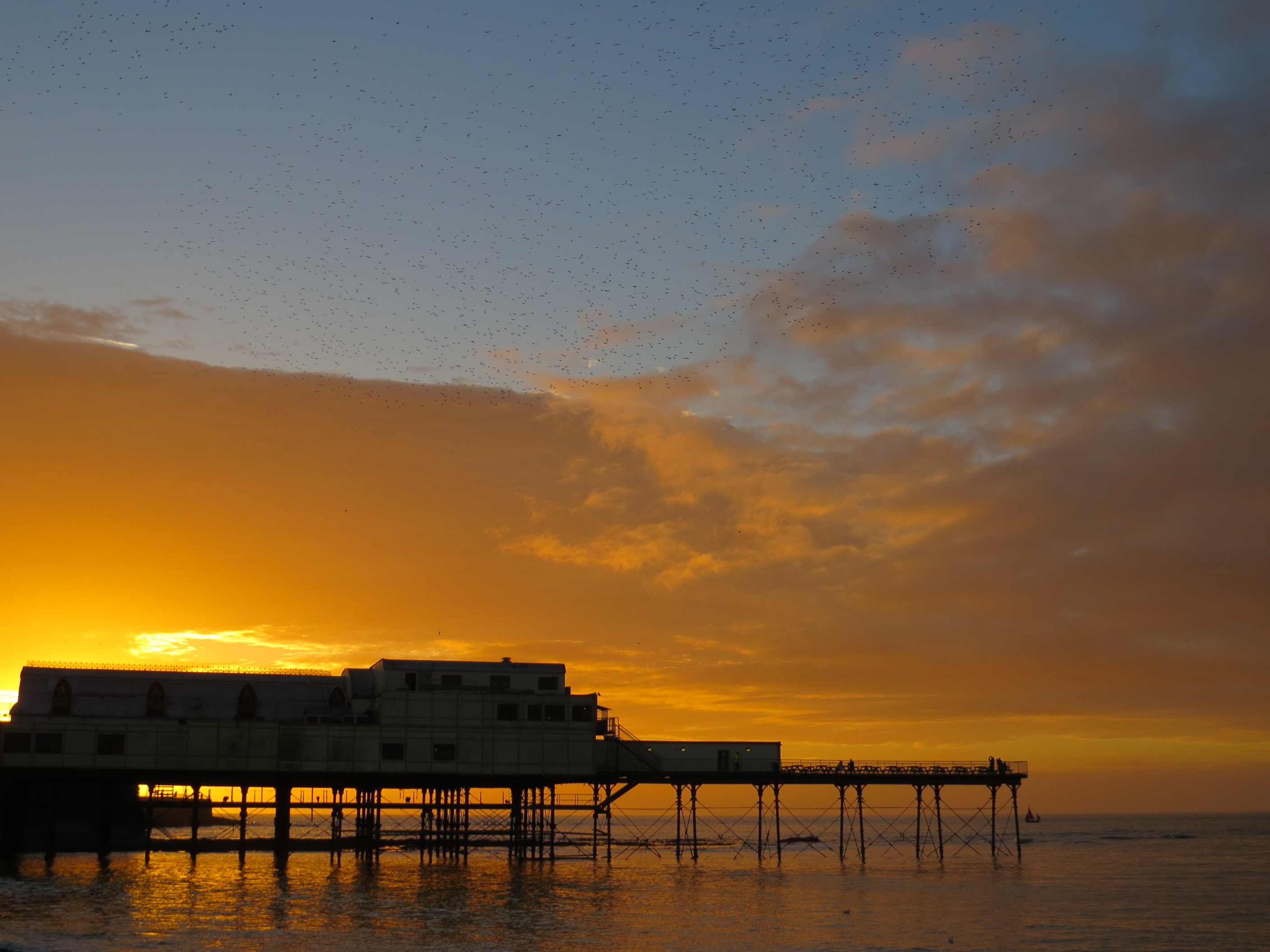 Drudwy uwchben y pier